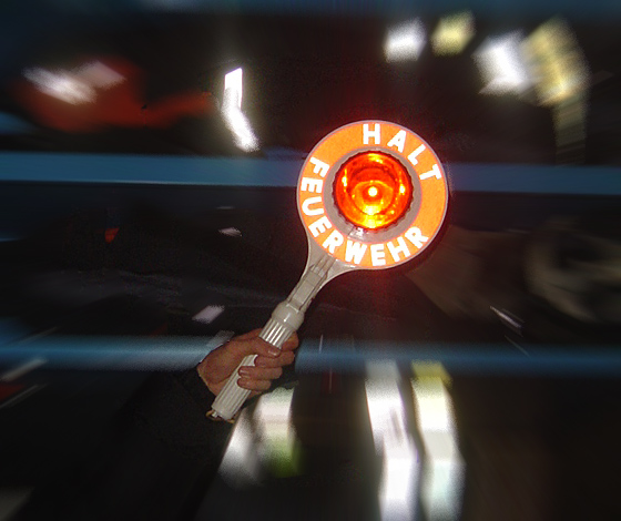 Winkerkelle der Feuerwehr Hamburg.